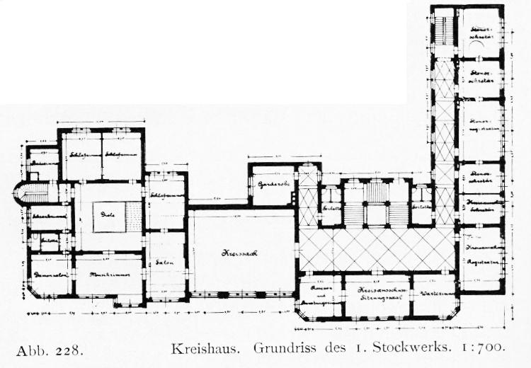 Kreishaus Düsseldorf an der Kasernenstraße, Ecke Bahnstraße in Düsseldorf, 1901 bis 1903 Architekt Fr. Aug. Küster, Grundriss